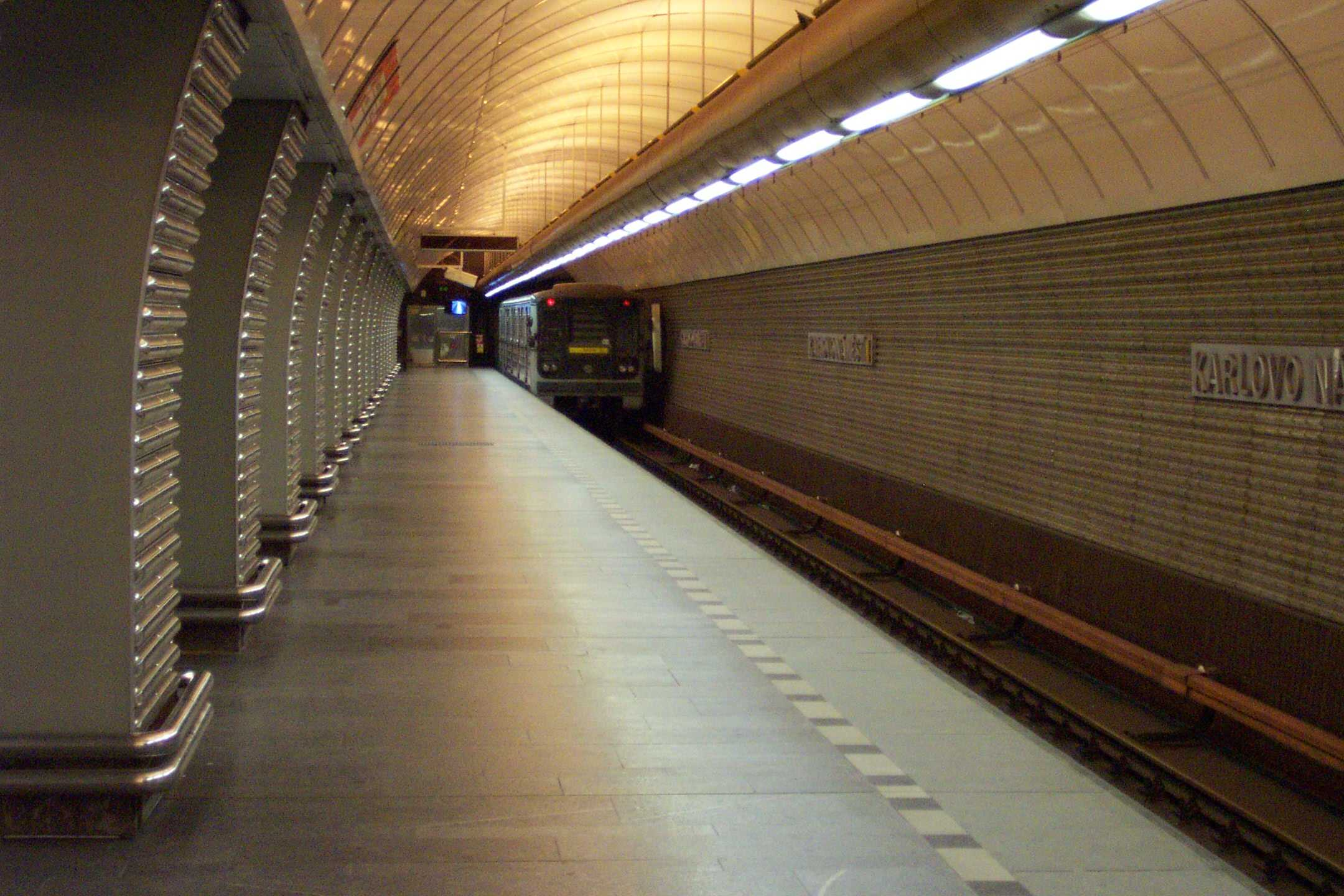 Tunnel of prague metro station Karlovo náměstí - Boční loď stanice metra Karlovo náměstí